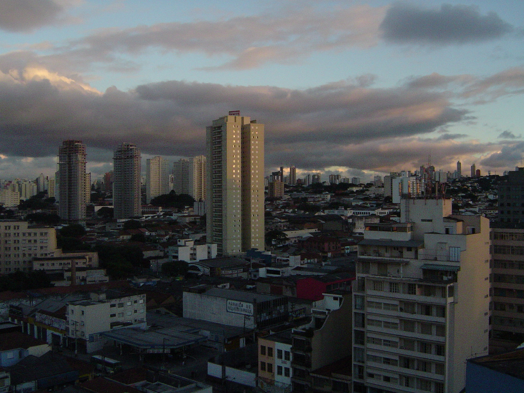 Distrito da Lapa SP